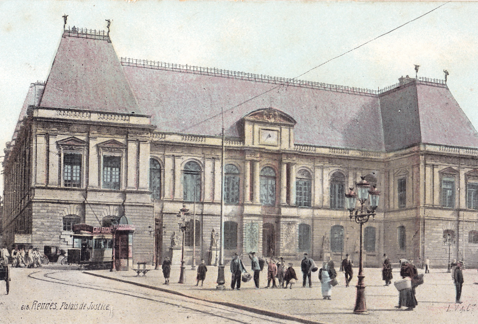 Carte postale ancienne éditée par LV & Cie, n° 618 :RENNES - Palais de Justice